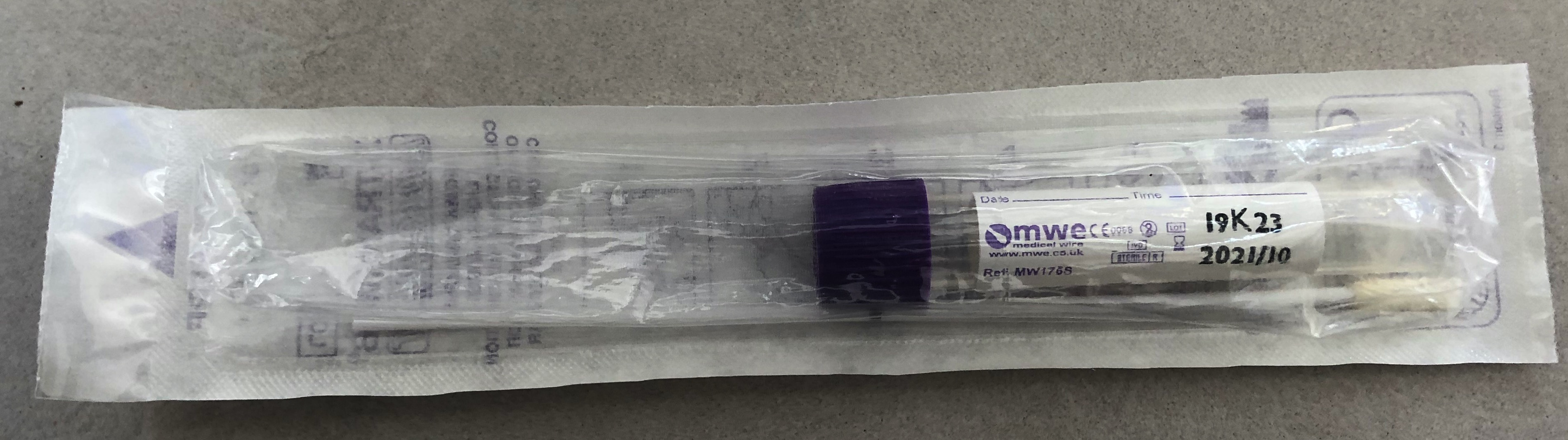 Test-Kit für Covid19-Infektion